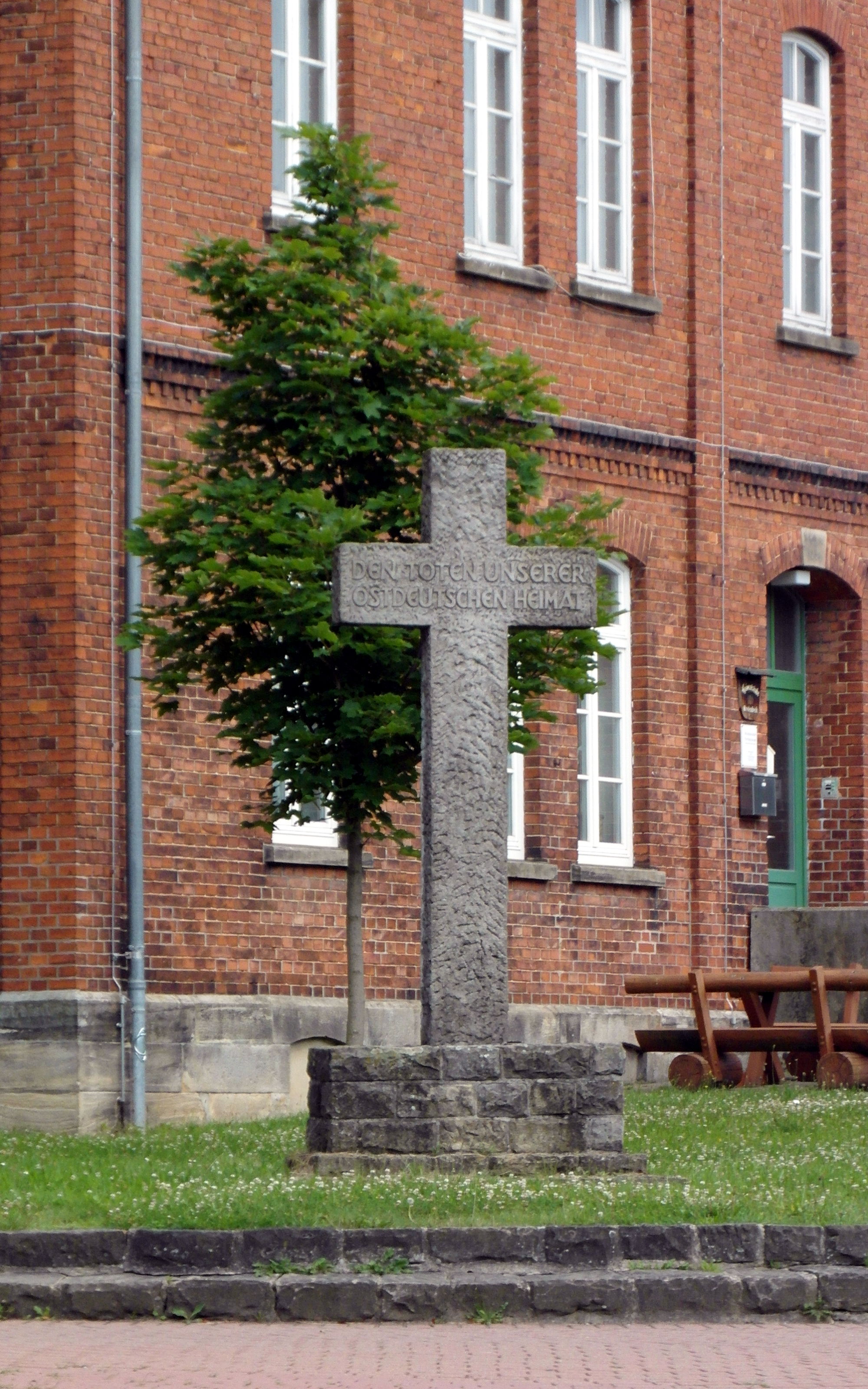 Gedenkstein (sogenanntes Ostkreuz) samt Baum in Bredenbeck; Foto vom Fussweg diagonal gegenüber